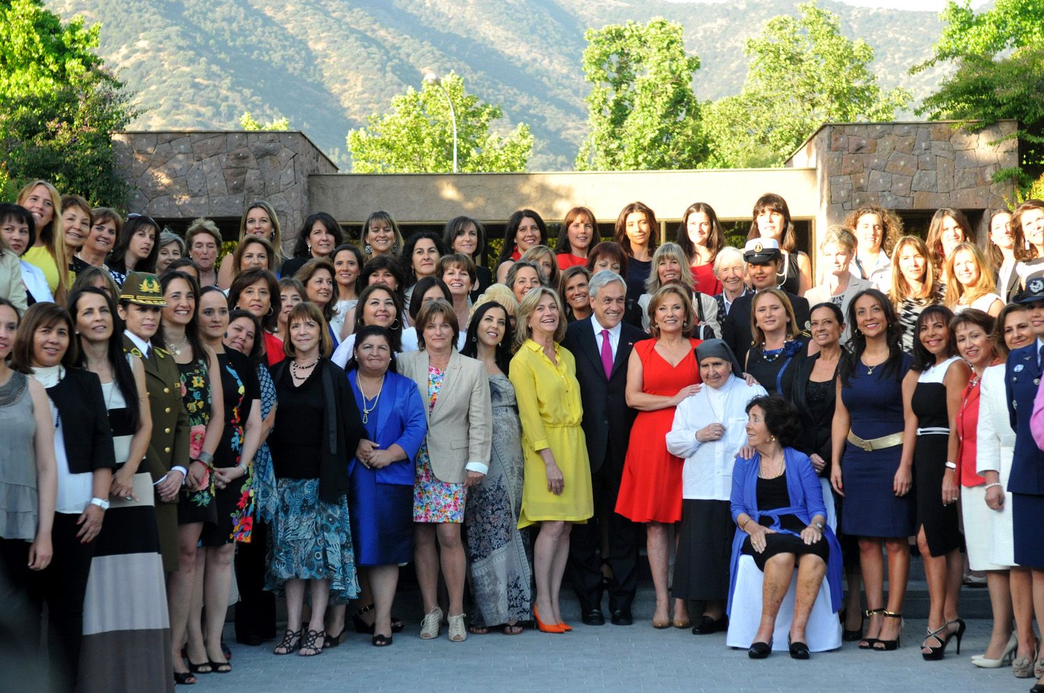 Premiación 100 Mujeres Lideres